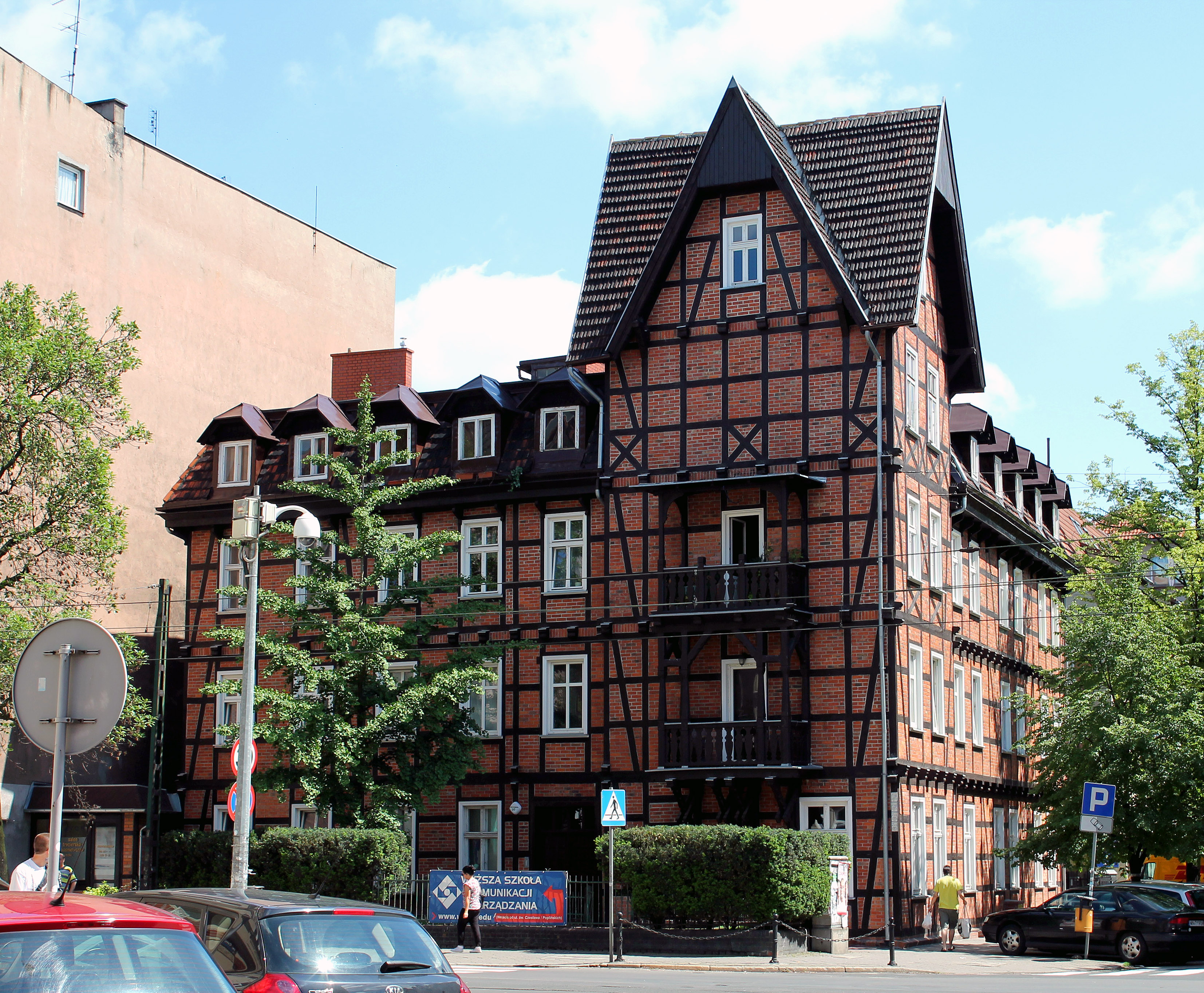 Budynek Spar- und Bauverein, ulica Wierzbięcice 20, po renowacji (2014)